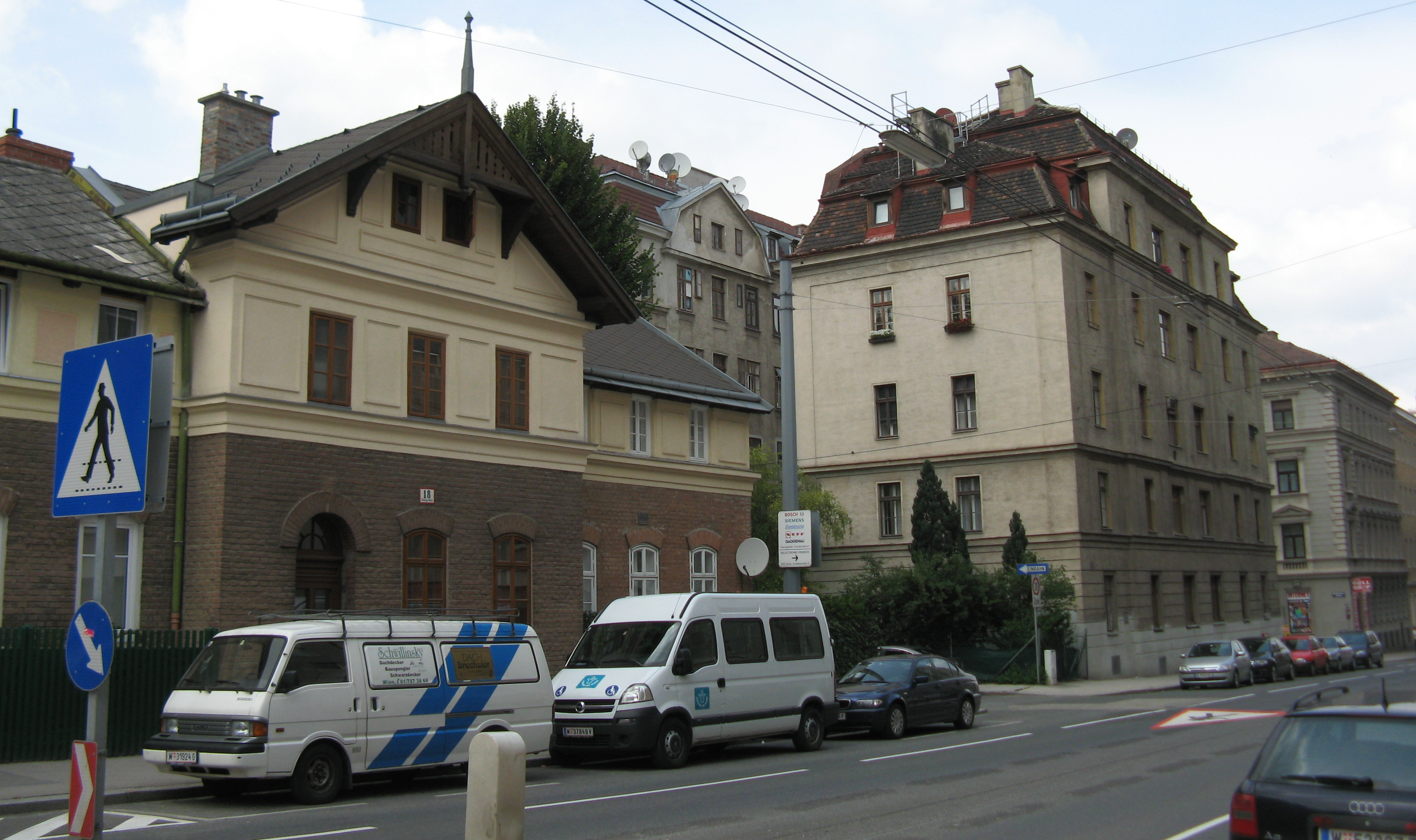 Arbeiter-Einfamilienhäuser (1886/87) von Josef Unger, Absberggasse 16-20, Wien-Favoriten